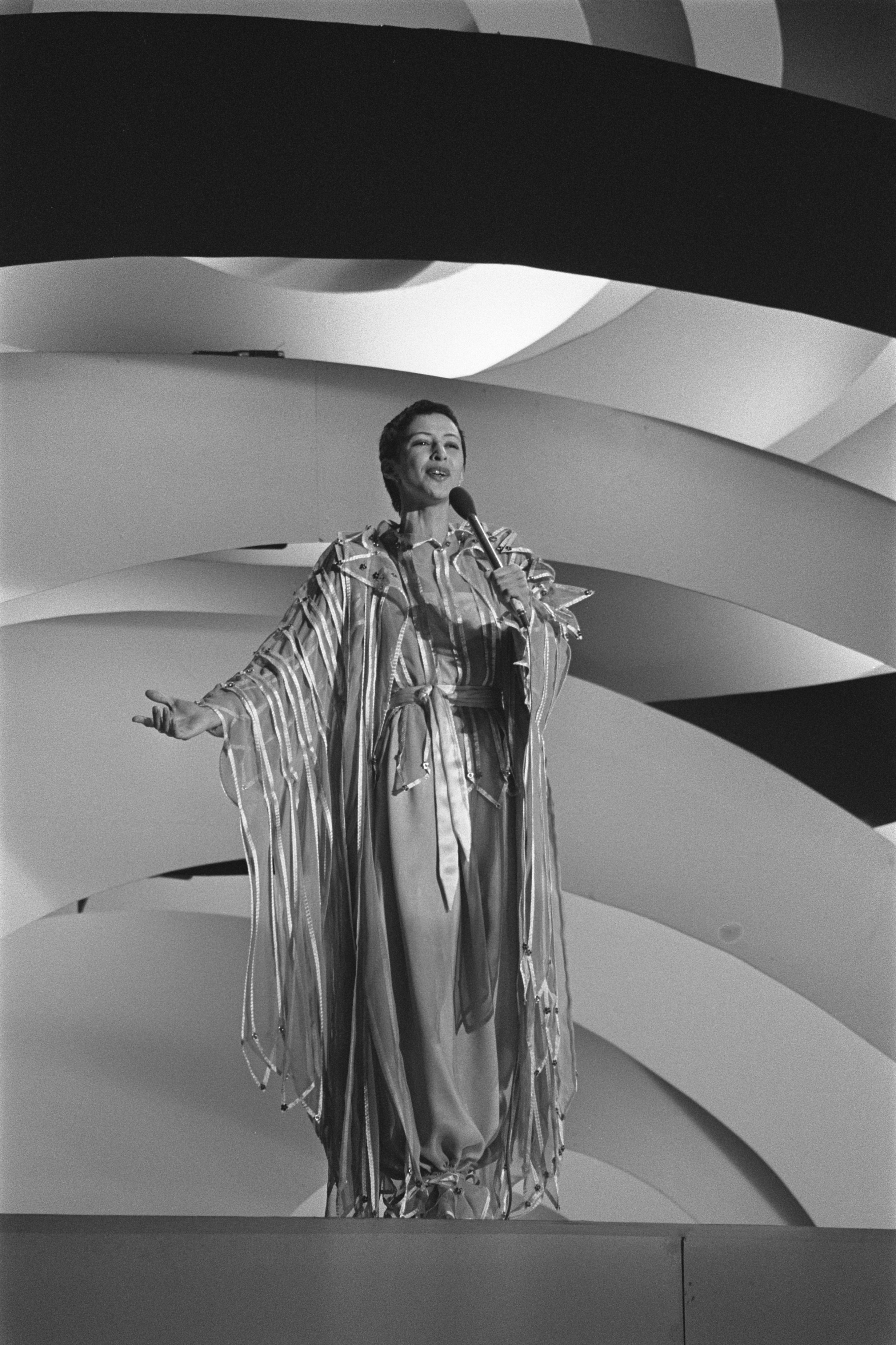 Collectie / Archief : Fotocollectie Anefo Reportage / Serie : [ onbekend ] Beschrijving : Songfestival; Heddy Lester tijdens optreden Datum : 2 februari 1977 Trefwoorden : Songfestivals Fotograaf : Suyk, Koen / Anefo Auteursrechthebbende : Nationaal Archief Materiaalsoort : Negatief (zwart/wit) Nummer archiefinventaris : bekijk toegang 2.24.01.05 Bestanddeelnummer : 929-0089